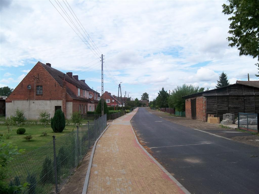 widok nowej drogi przez wieś.